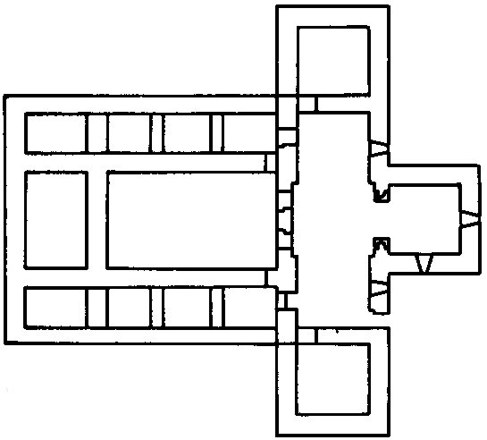 date du cliché : octobre 2001